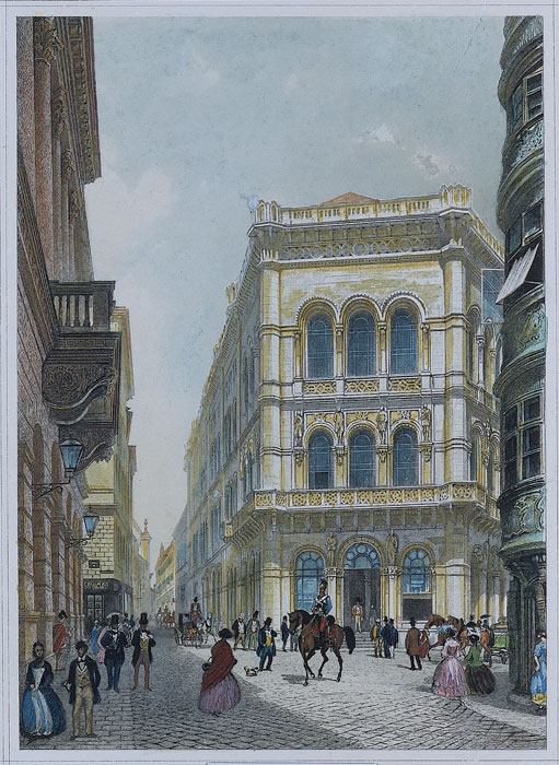 Das Bank- und Börsengebäude in der Herrengasse (Palais Ferstel), Wien.